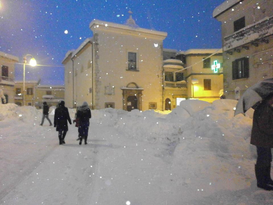 La straordinaria nevicata del febbraio 2012